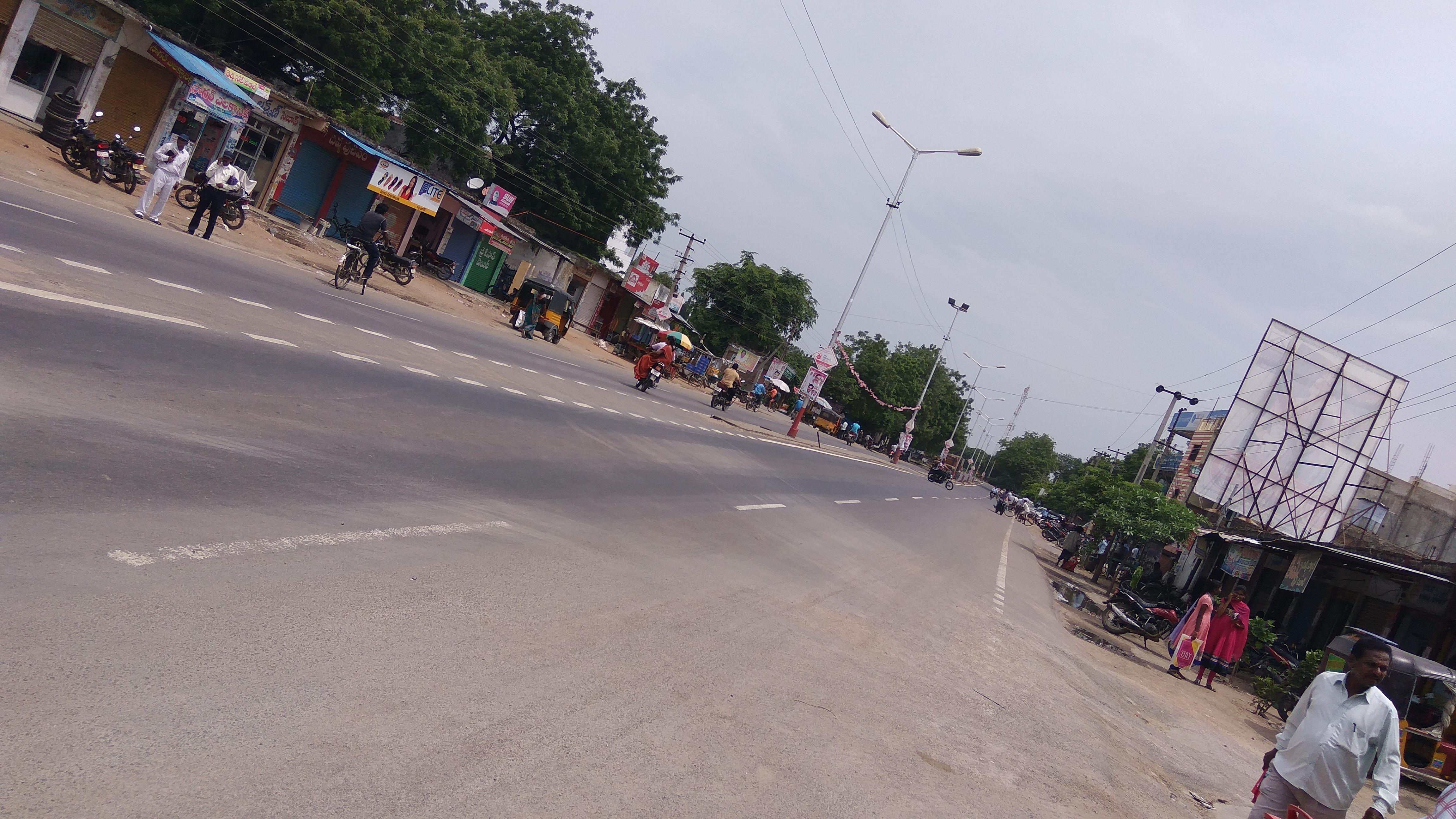 హుజురాబాద్ ప్రధాన రహదారి